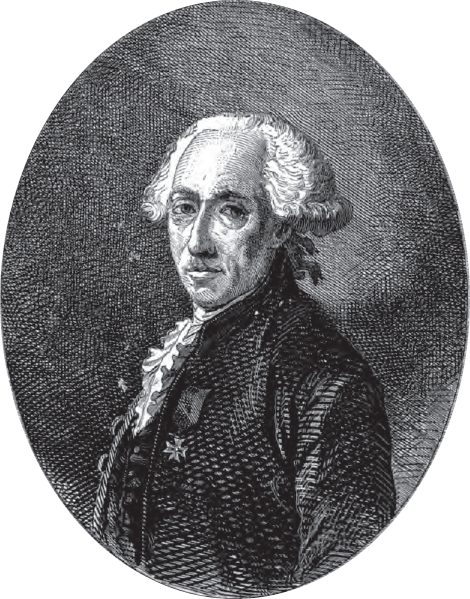 Louis Alexandre de La Rochefoucauld Duke of Enville